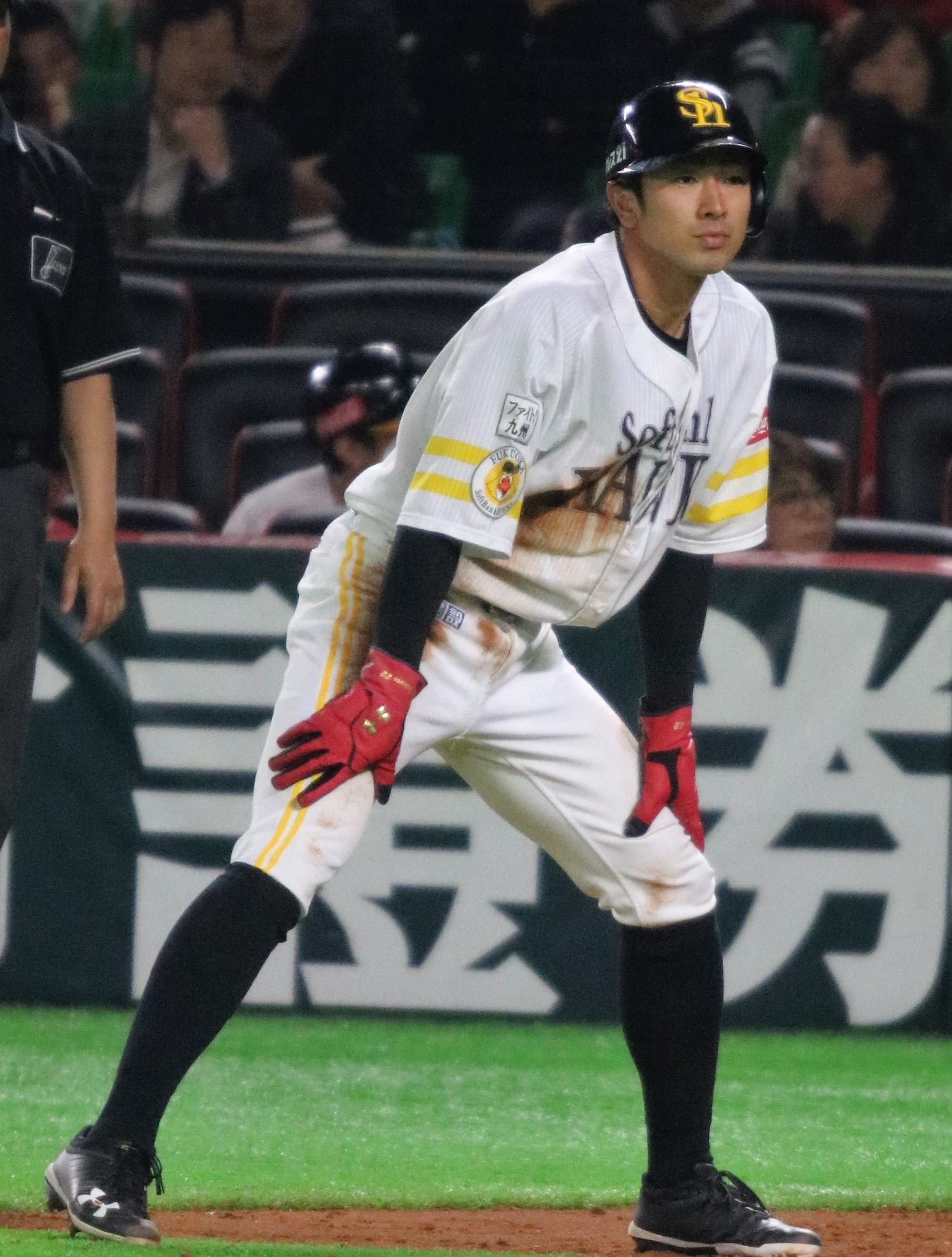 2018年3月24日 vs広島東洋カープ